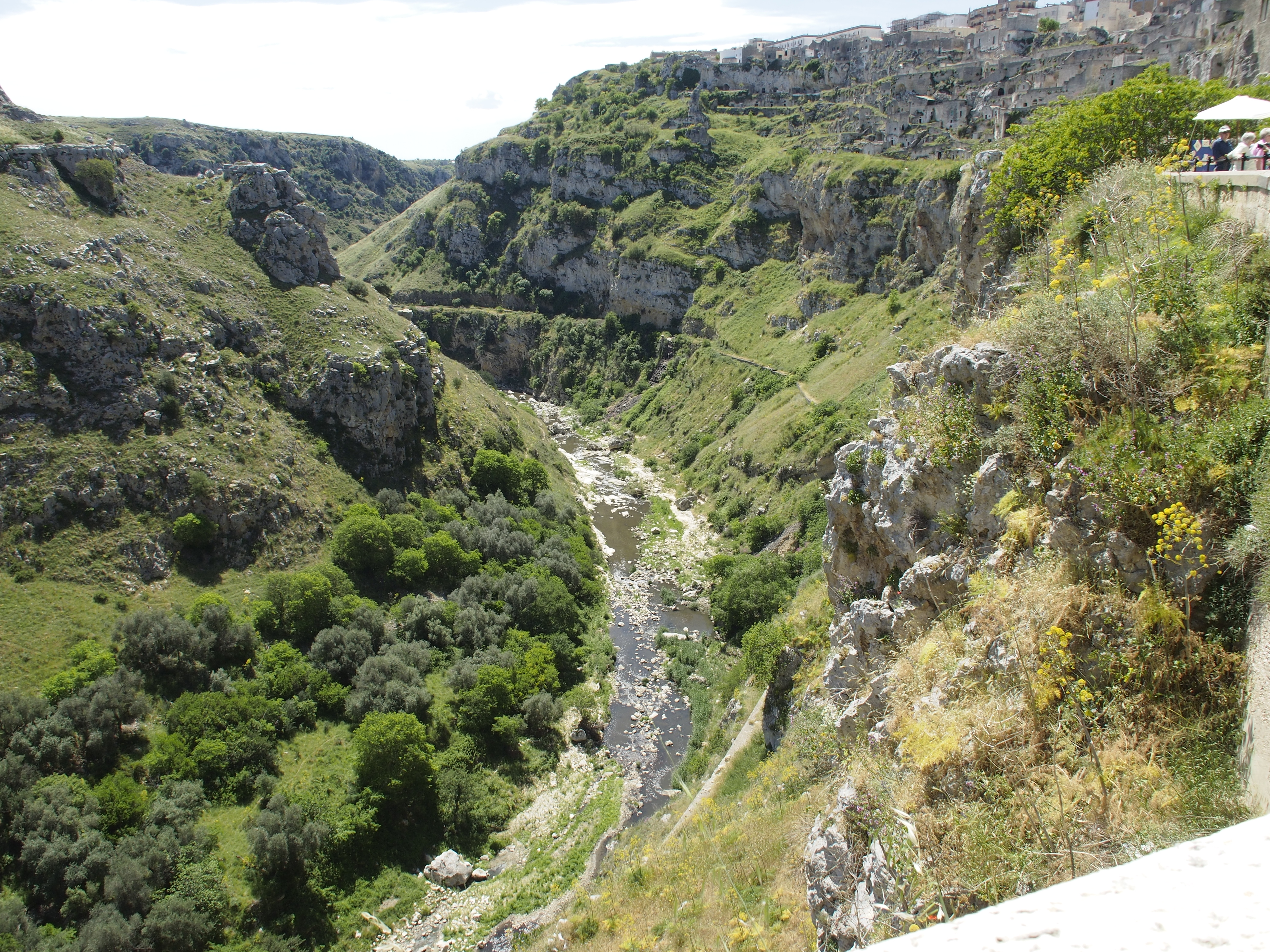 Schlucht von Matera